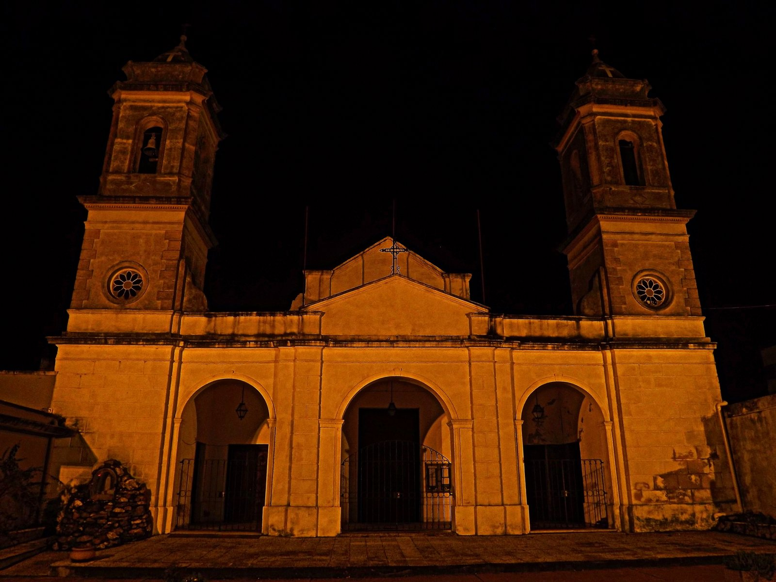 Parroquia del Santísimo Salvador. Ubicada en el departamento de Canelones